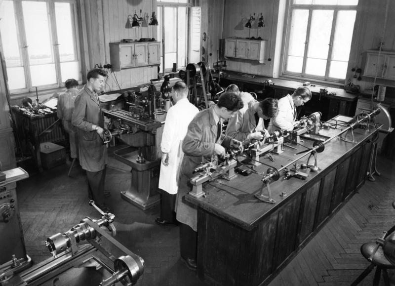 Furtwangen/Schwarzwald Staatl. Ingenieurschule für Feinwerktechnik Werkstätte für Feinmechanik